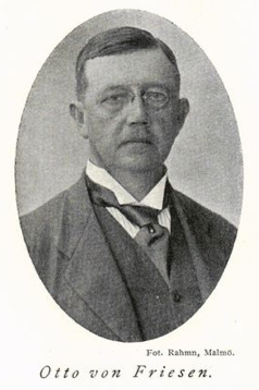 Otto von Friesen